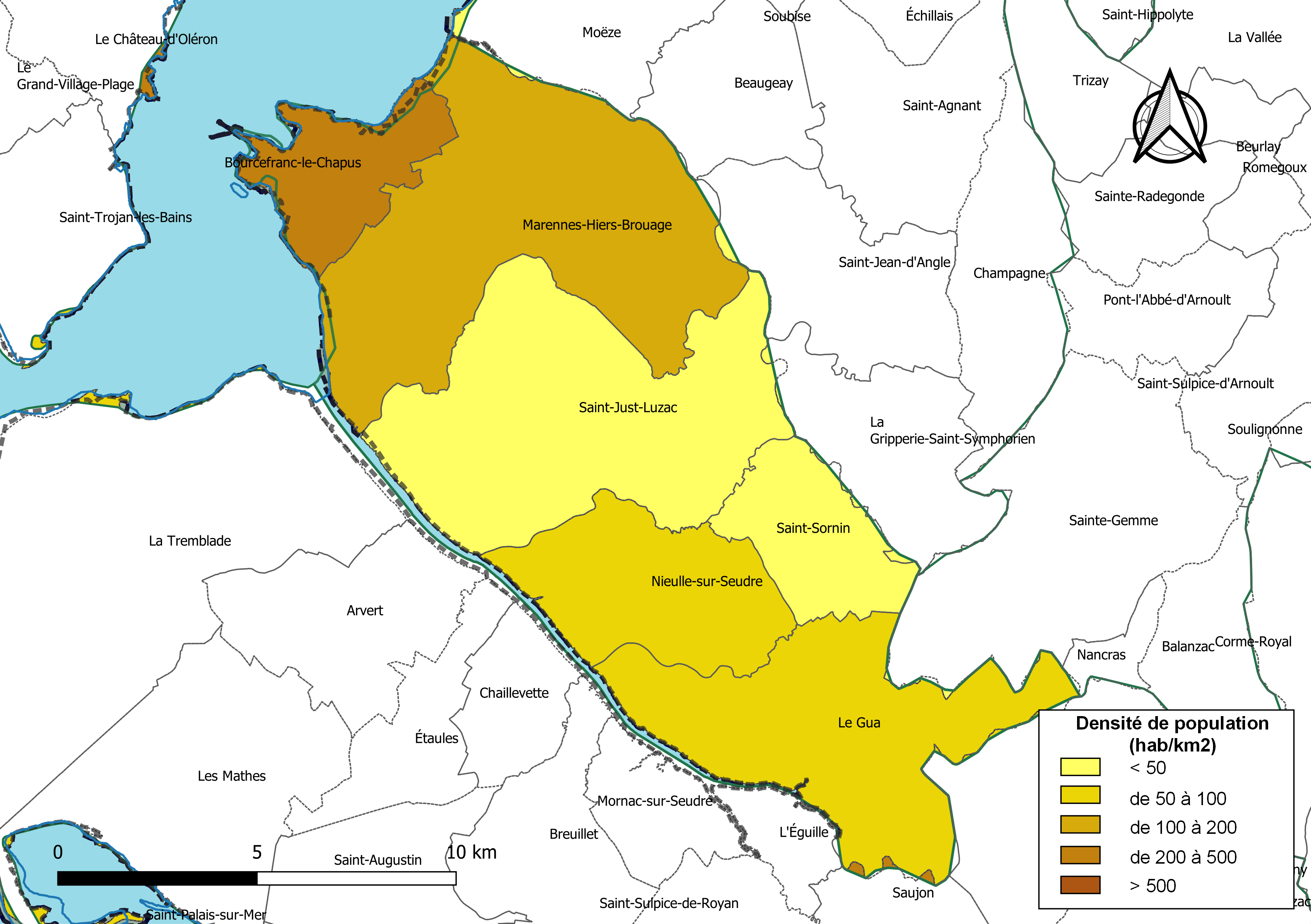 Carte des densités de population (millésimée 2016) des communes de la communauté de communes la Communauté de communes du Bassin de Marennes, département de la Charente-Maritime, France. Composition au 1er janvier 2019.